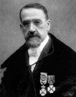 Joseph Jean Baptiste Neuberg (30 octobre 1840 à Luxembourg - 22 mars 1926 à Liège) est un mathématicien connu pour ses travaux dans la géométrie moderne du triangle